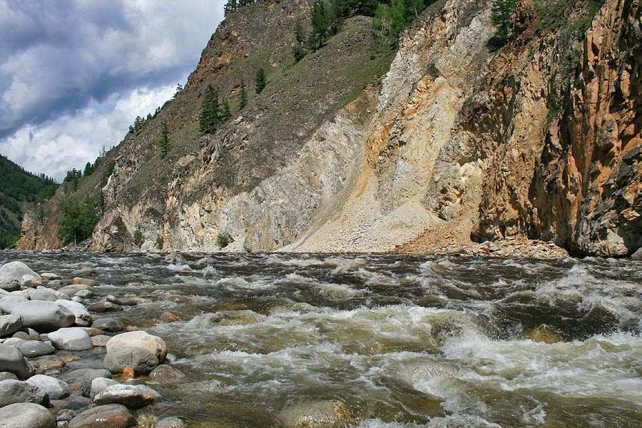 Второй порог Анкоконского прорыва на реке Баргузин